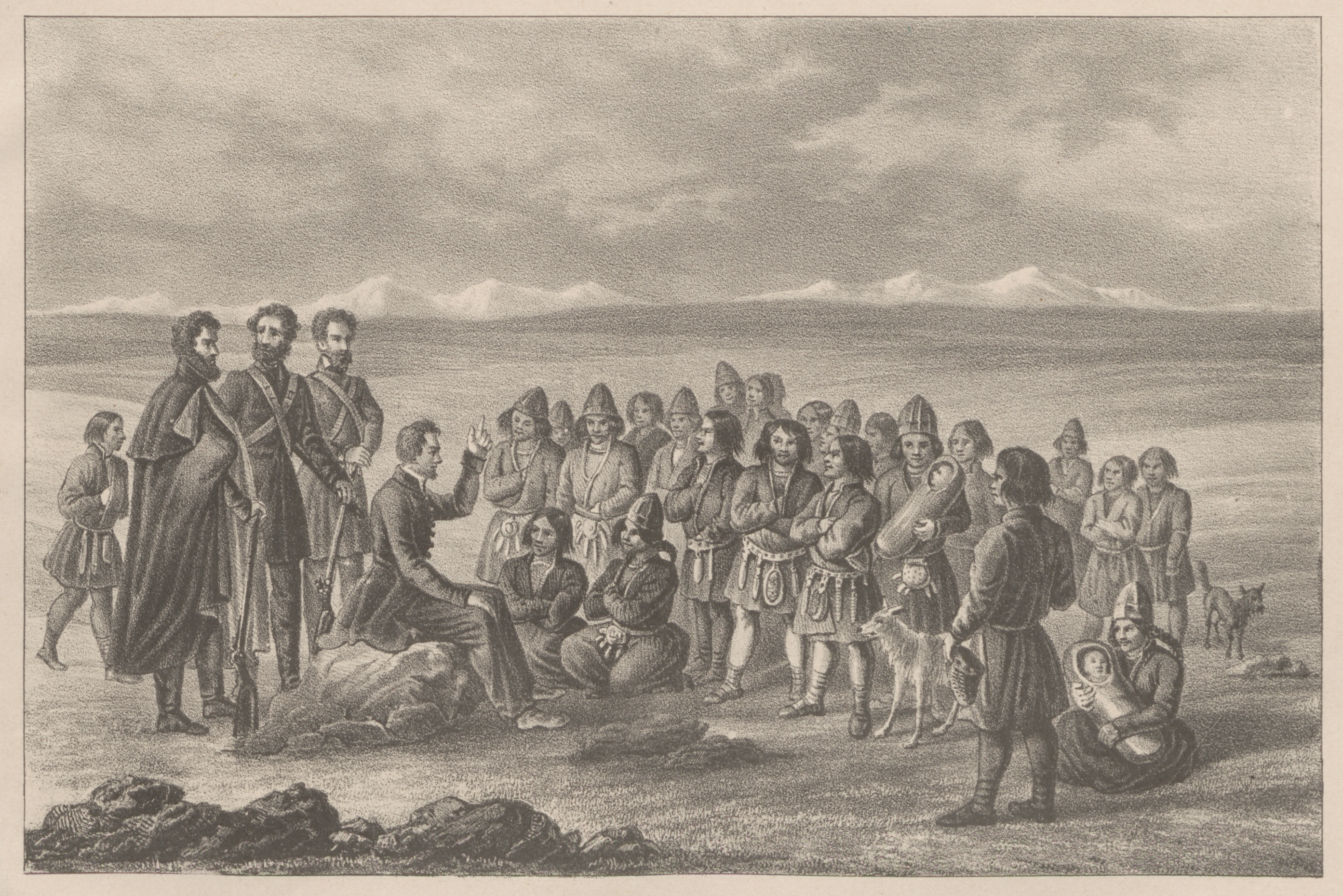 Bildet inngår som ett av 20 litografier Hogguér, Daniel: "Zwanzig Lithographirte Tafeln zu von Hogguér's Reise nach Lappland und dem nördlichen Schweden", Berlin 1841